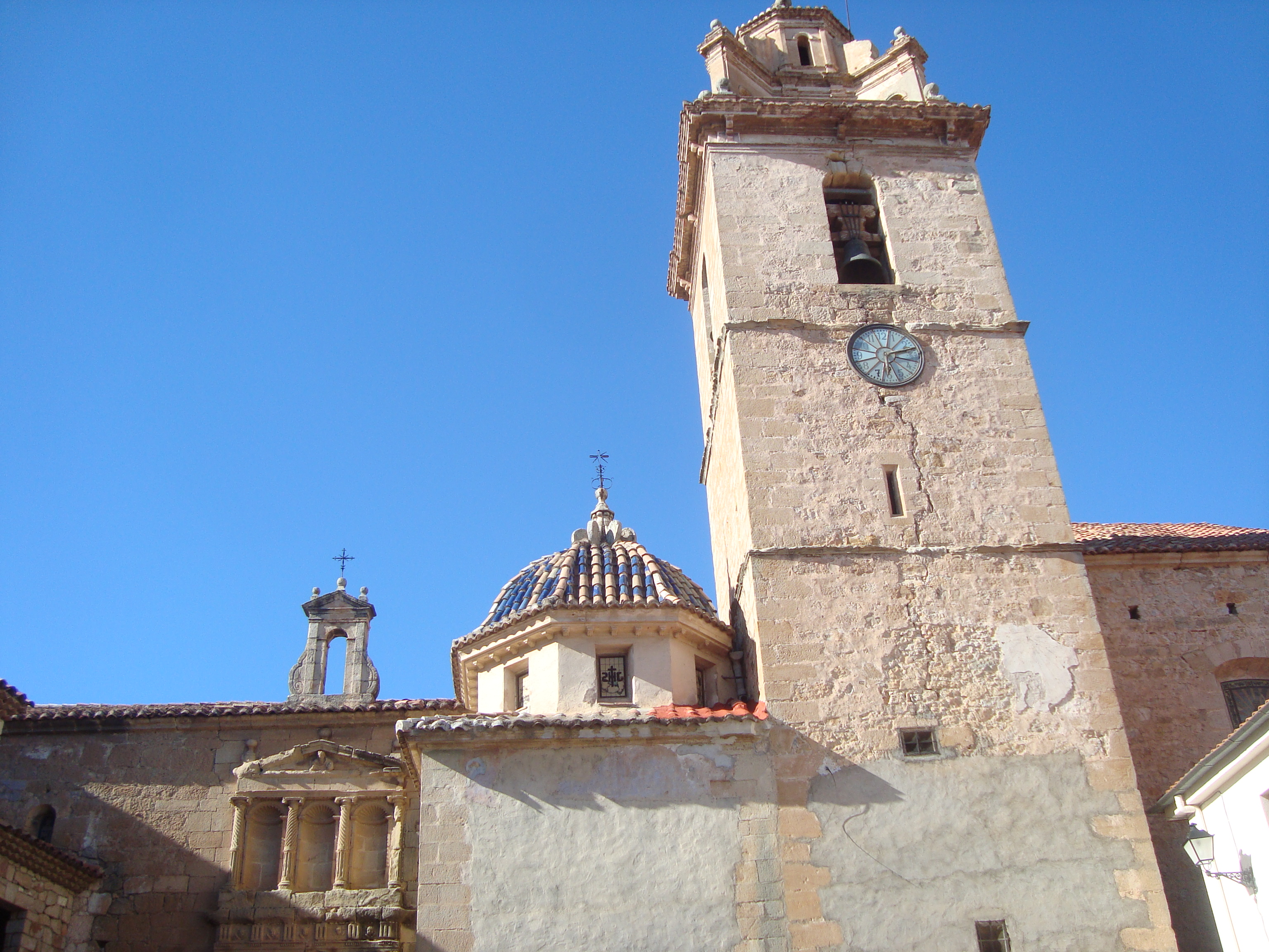 Església parroquial del Salvador (Sucaina) 08.142-001.